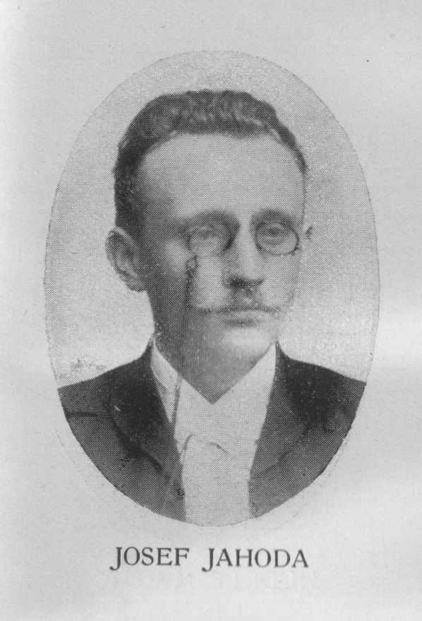 Josef Jahoda (1872 - 1946), Český pedagog, novinář, prozaik a básník.